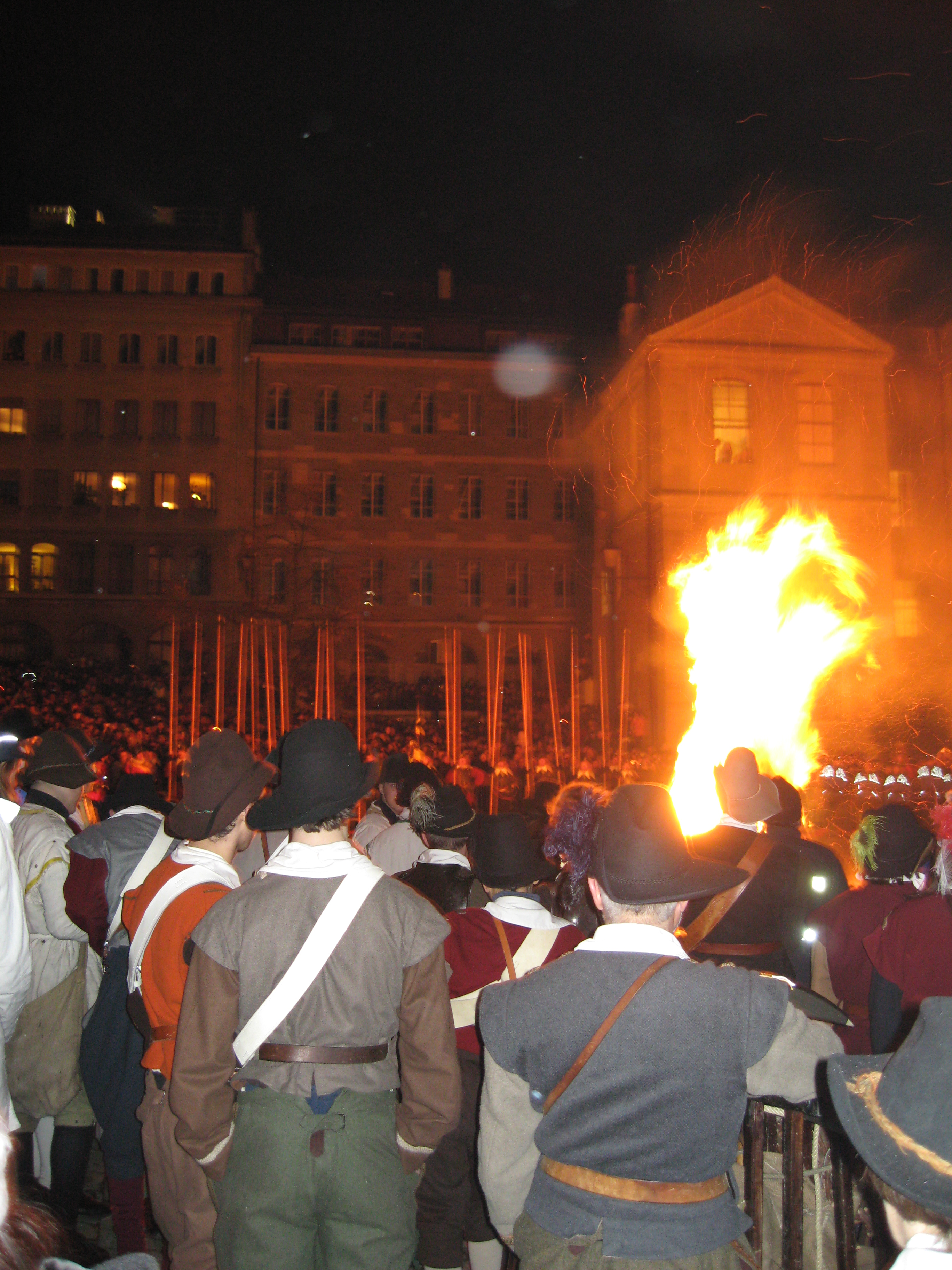 Feu de joie Cour Saint-Pierre